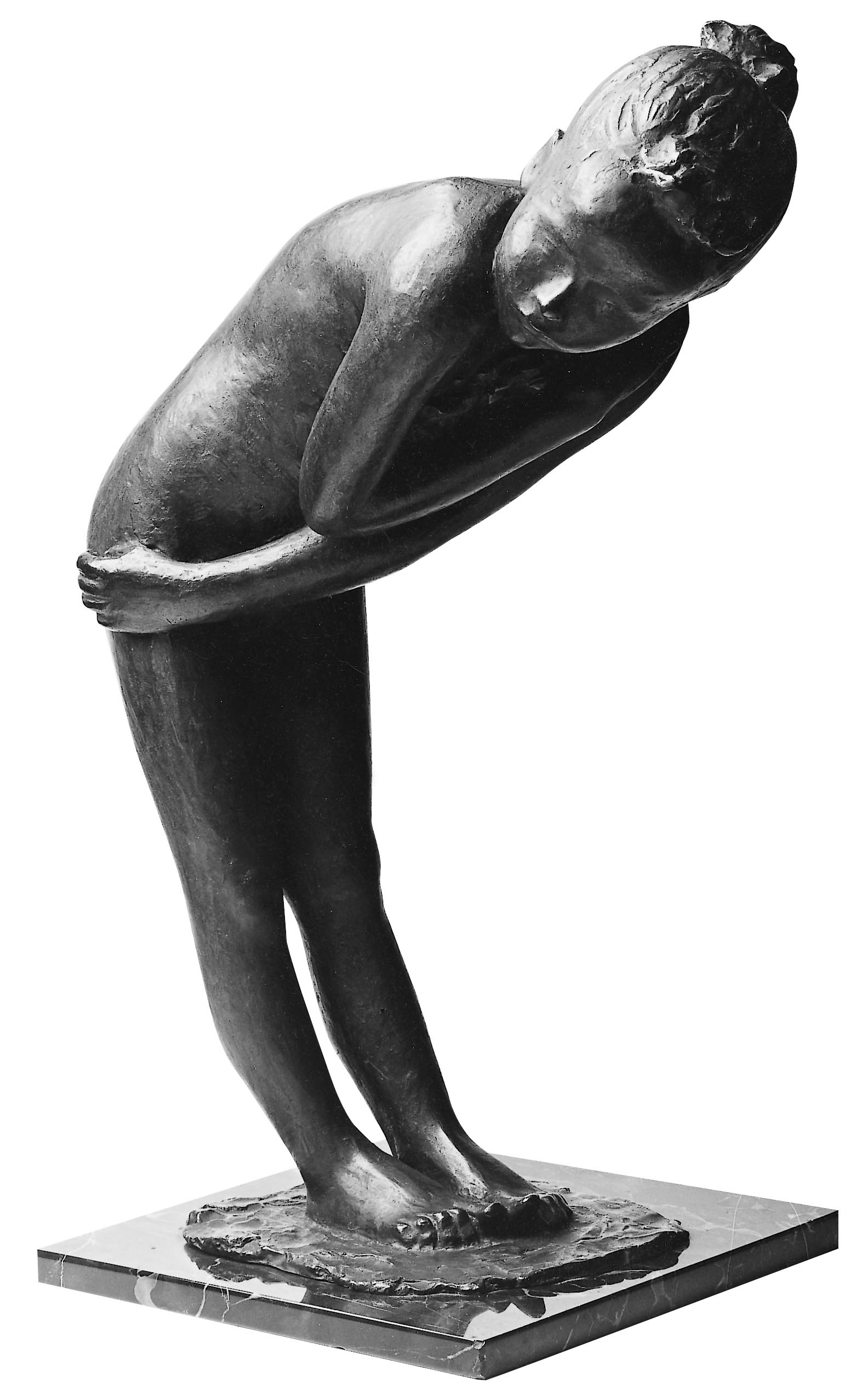 Angelo Frattini's sculpture